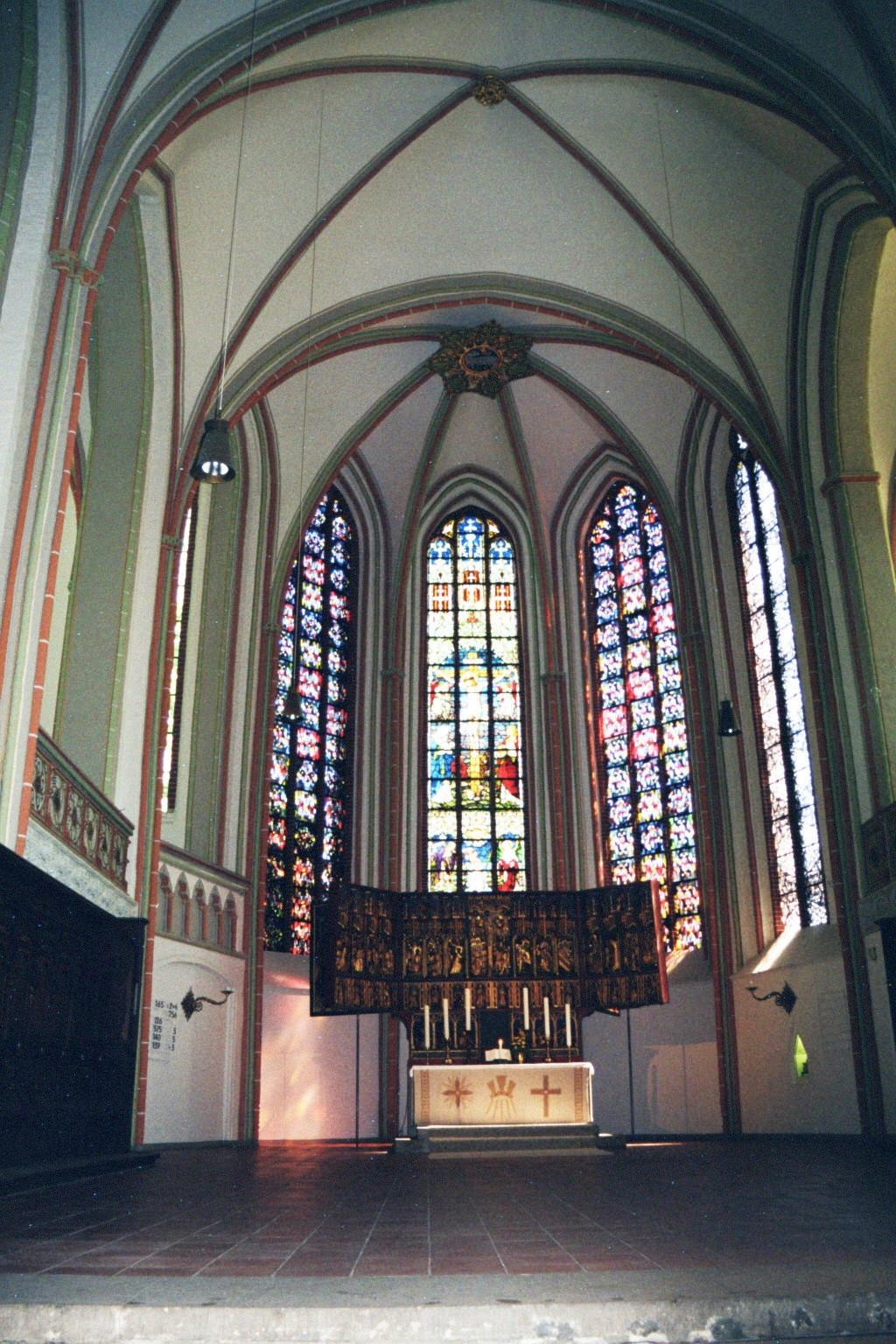 Lüneburg